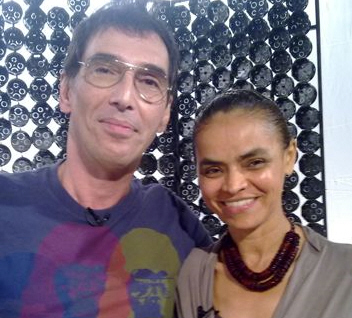 Senadora Marina Silva e cantor Lobão.